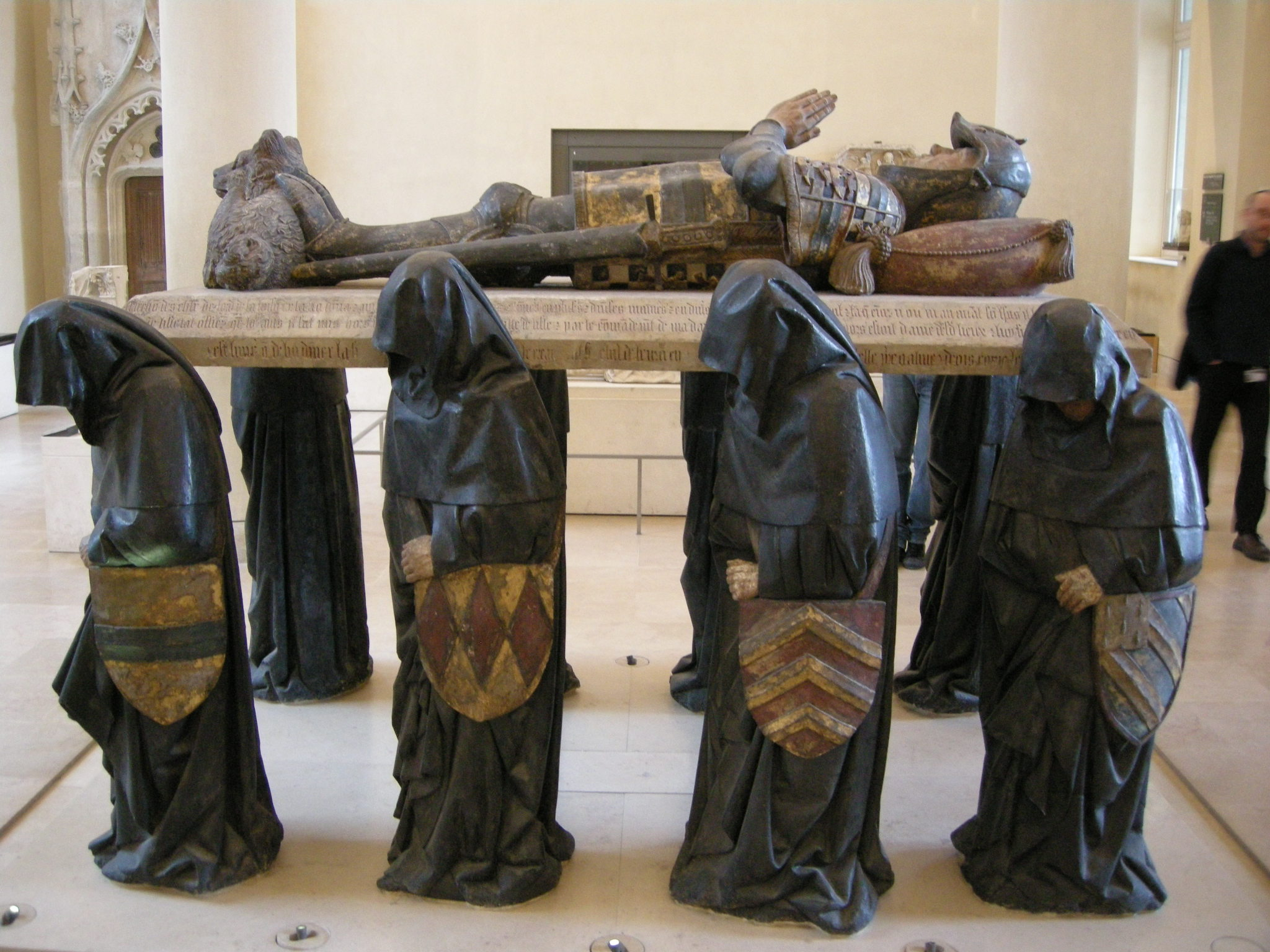 Tomba di Philippe Pot.JPG